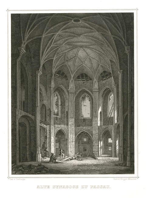 „Alte Synagoge zu Passau“ [= St. Salvator], Stahlstich von J. Poppel nach Seeberger, 1846 aus: Maximilian Benno Peter von Chlingensperg: Das Königreich Bayern in seinen alterthümlichen, geschichtlichen, artistischen und malerischen Schönheiten, 1843-1854